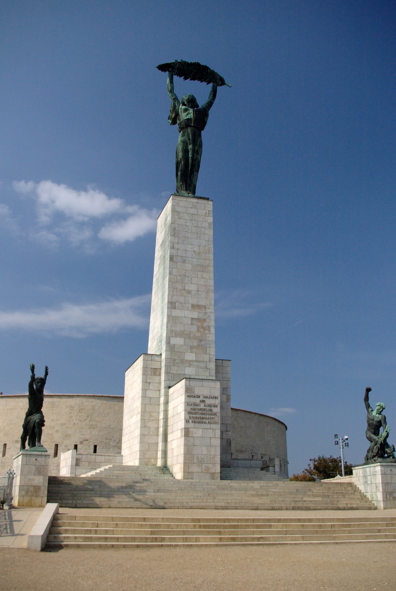 Freiheitsstatue an der Zitadelle auf dem Gellértberg